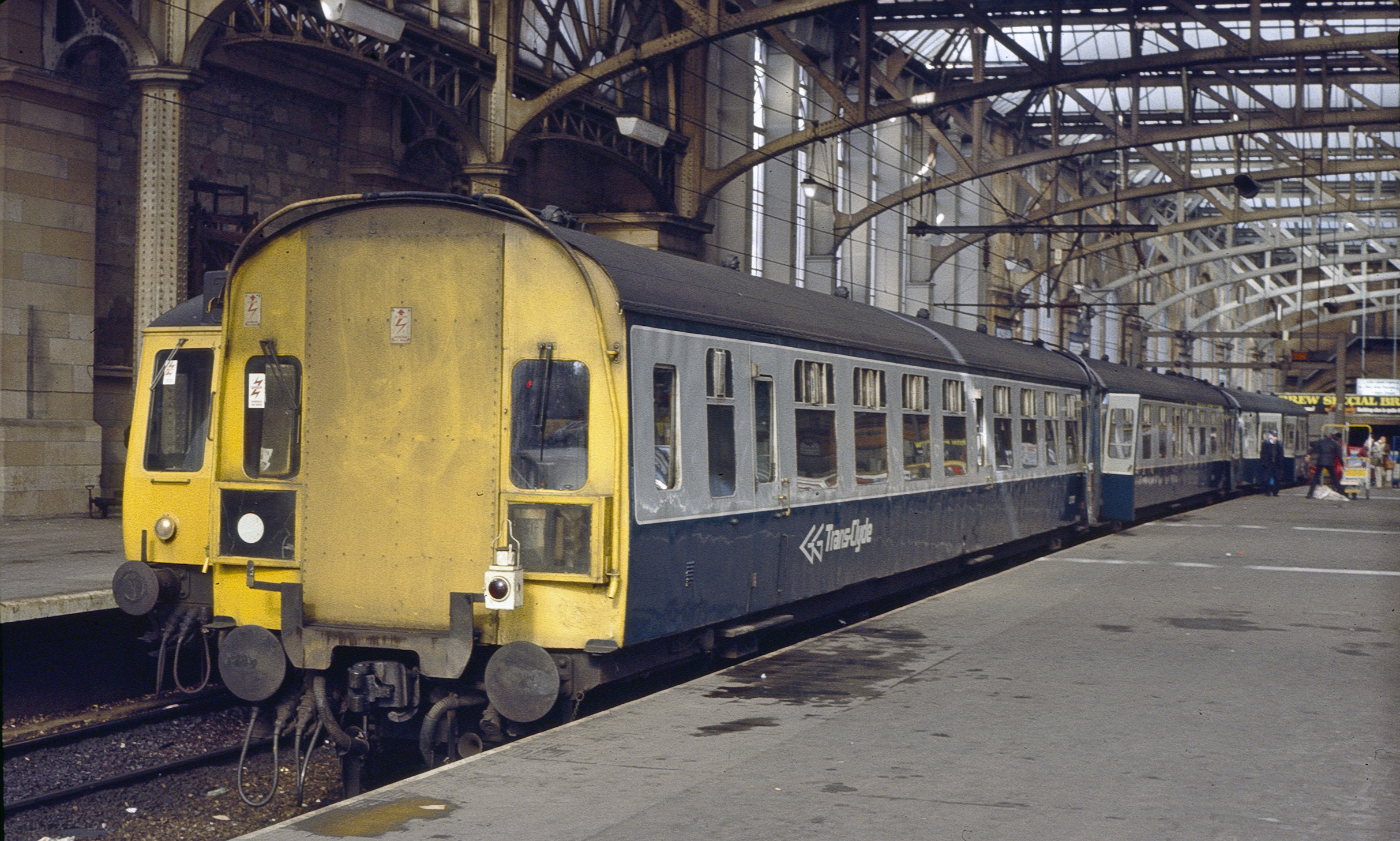 March 1982